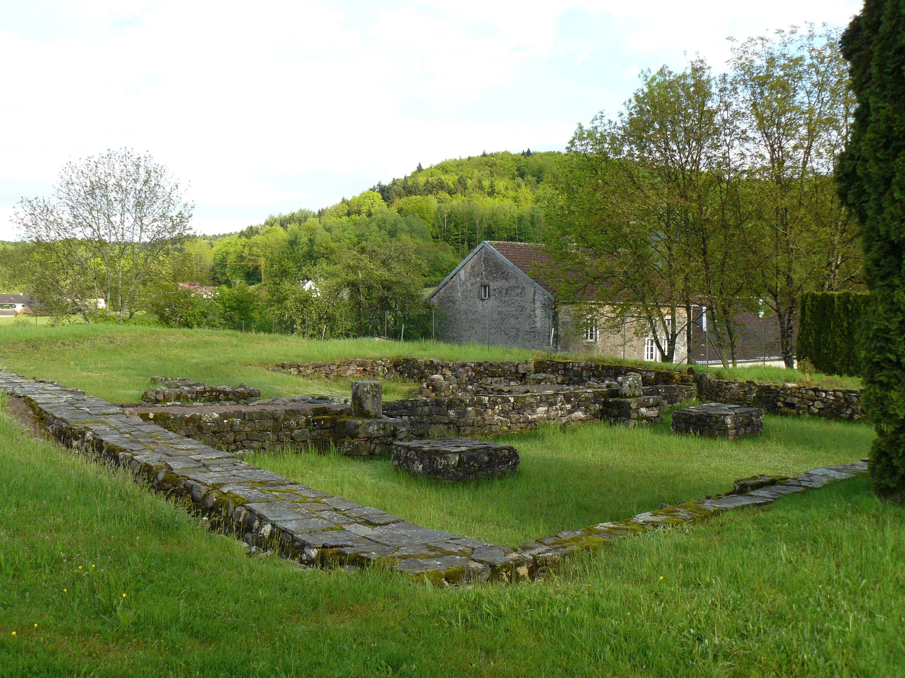 Annegray (commune de La Voivre, Haute-Saône, France) : ruines du prieuré fondé par Saint Colomban vers 595.